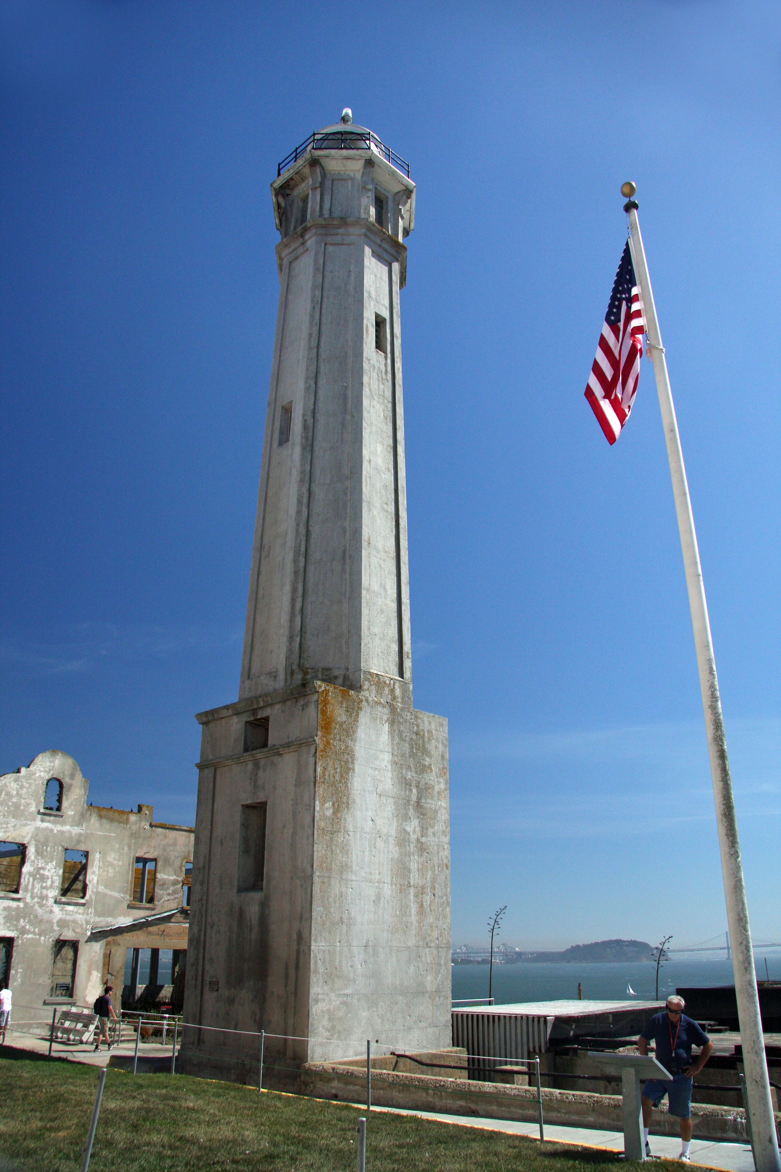 Alcatraz 40